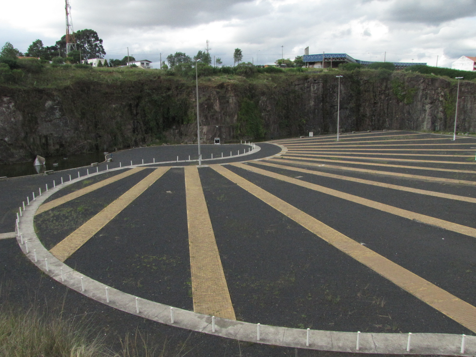 Praça da Fé - Guarapuava ""O NOME CORRETO DA PRAÇA É PRAÇA DA BÍBLIA E NÃO PRAÇA DA FÉ.""